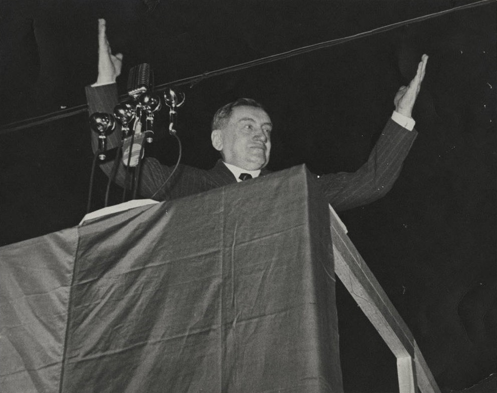 Arturo Alessandri se dirige desde el estrado a los concurrentes a la Plaza Bulnes en una concentración en apoyo a Juan Antonio Ríos en 1942.